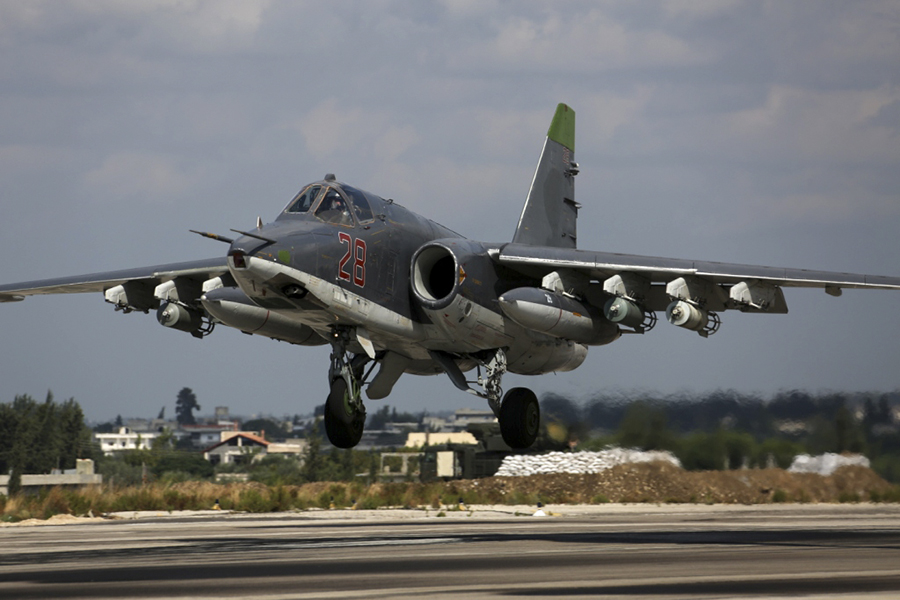 Боевая работа российской авиации в Сирии